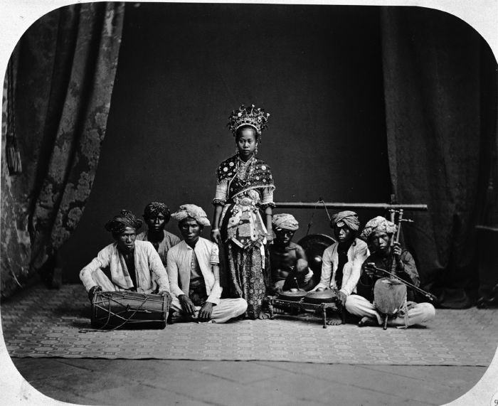 Foto. Een ronggeng met orkest.